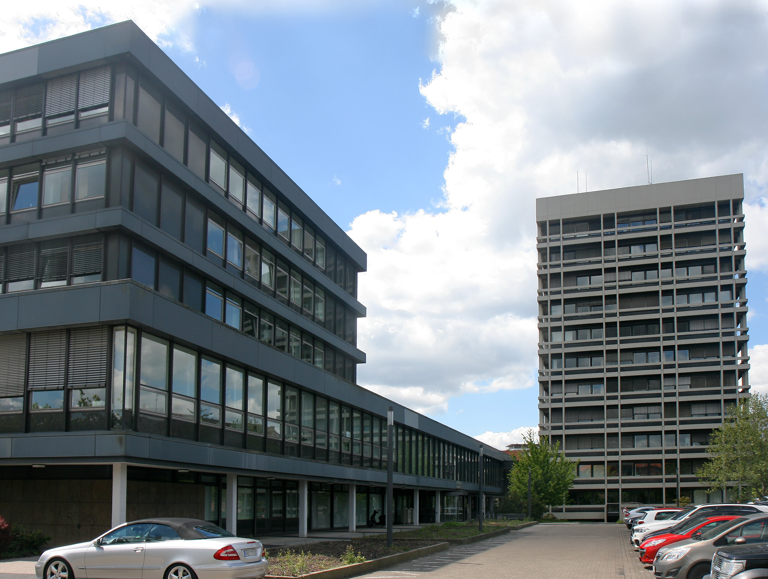 Justizbehörden Hildesheim (Amtsgericht, Landgericht und Staatsanwaltschaft), Kaiserstraße 60 in Hildesheim.